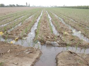 Riego por sulcos alimentados por un canal Autor: Alfredobi Fecha: 2004